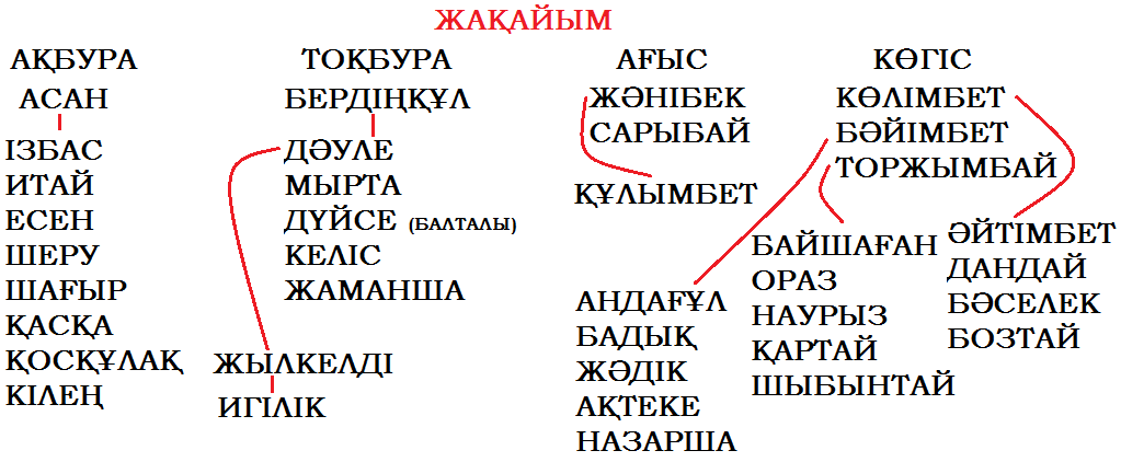 ЖАҚАЙЫМ